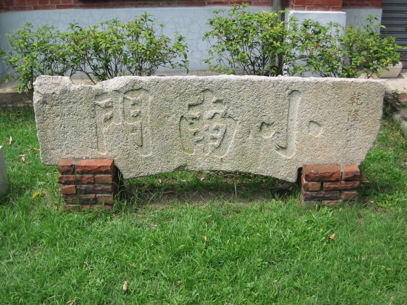 臺南小南門門額